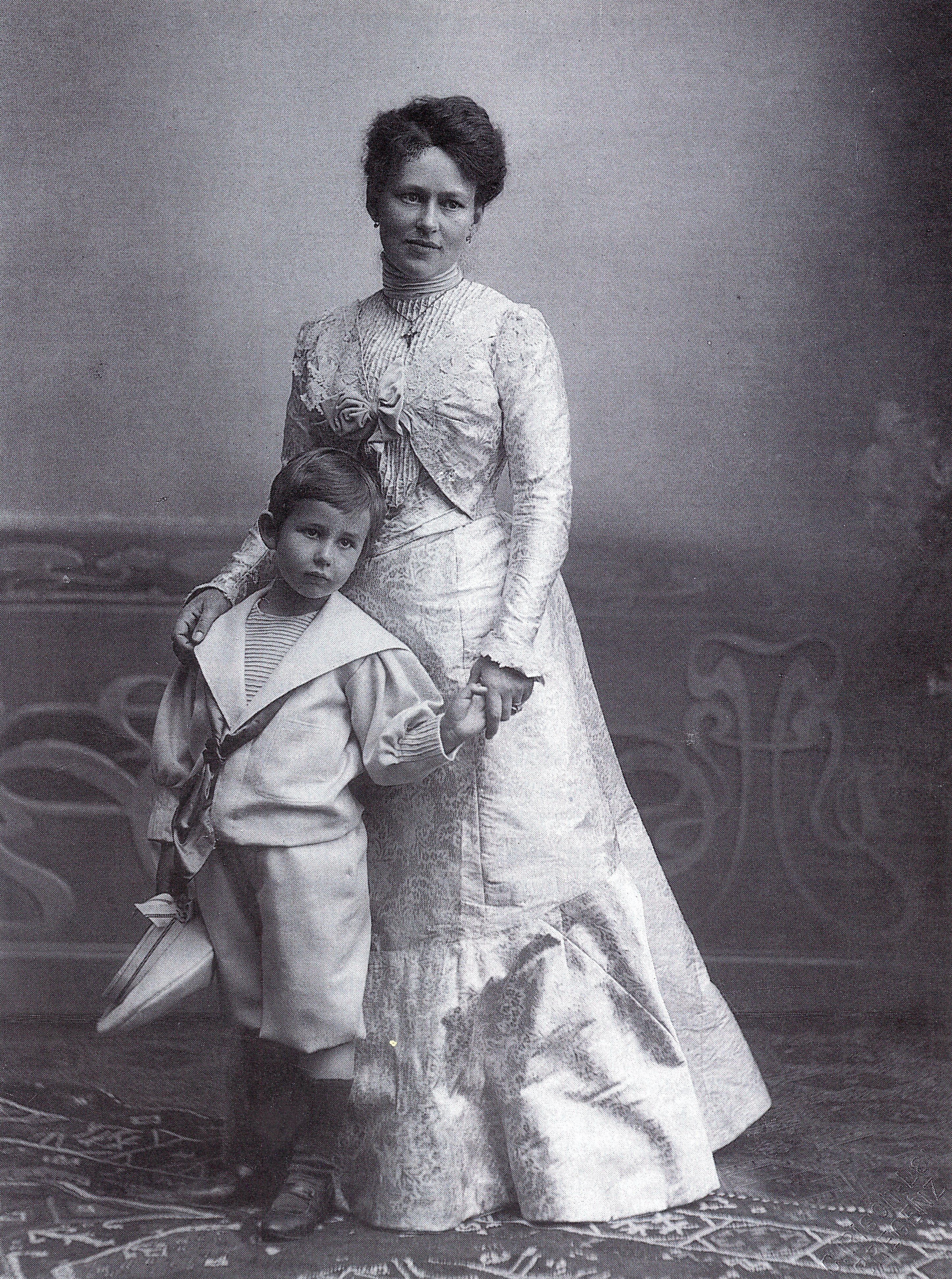 Frau Maria Margaretha Verena Jenny Schindler mit ihrem Sohn Fritz (* um 1900) Hausherrin der Villa Grünau in Kennelbach und Gattin von Friedrich Wilhelm Schindler (Heirat 1887). Dr. Fritz Schindler, Miteigentümer und Firmensprecher der Vorarlberger Kraftwerke (VKW), zog sich 1929 aus der Elektrizitätsgesellschaft zurück. Das Land Vorarlberg kaufte einen Großteil der VKW-Aktien